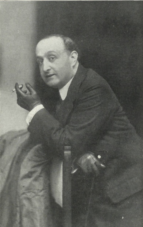 Emilio Thuillier, fotografiado por Audouard.